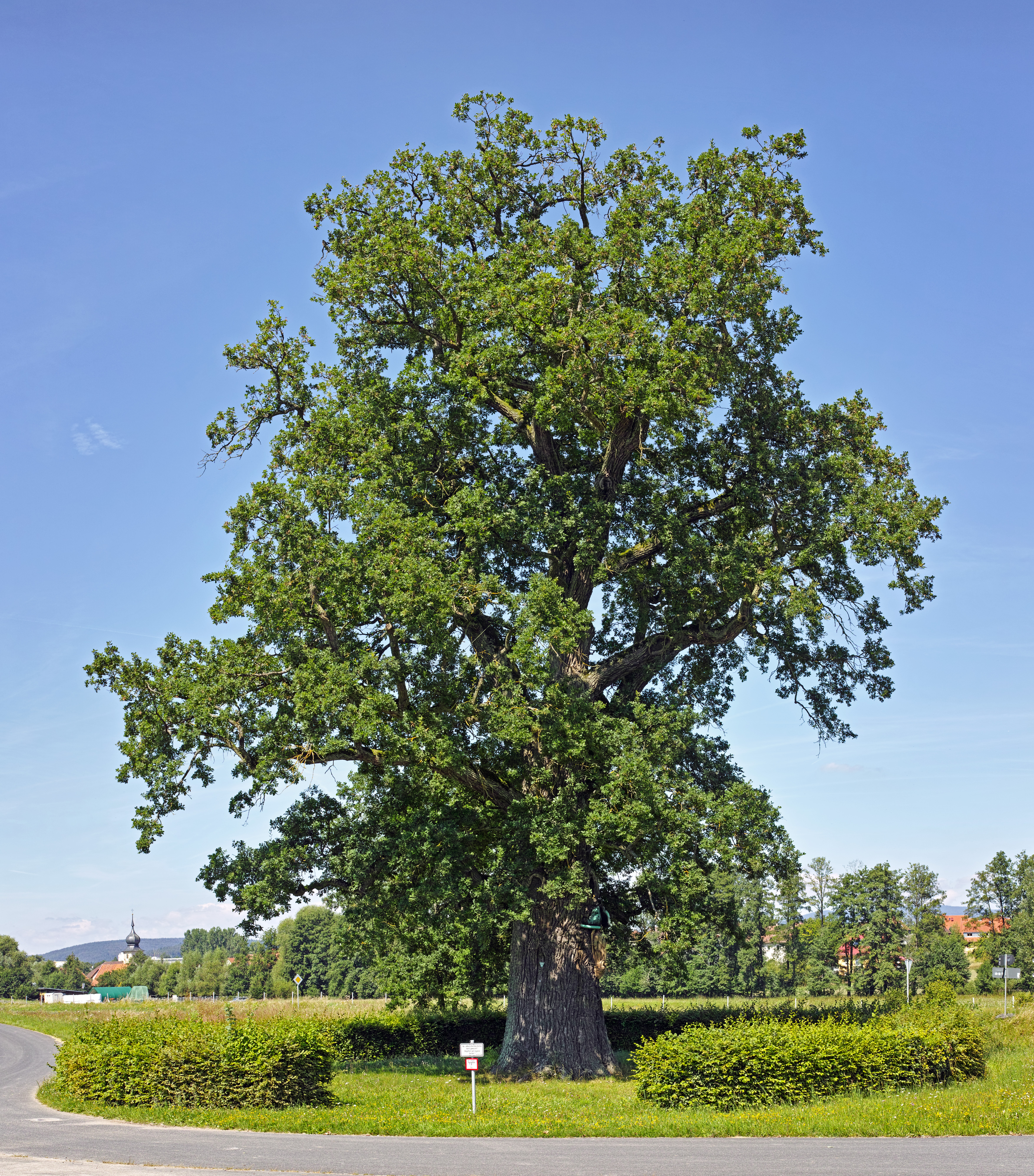 Die Bildeiche (auch Michaelseiche genannt) mit dem Erzengel Michael, steht etwa 500 Meter südöstlich von Albertshausen, einem Ortsteil von Bad Kissingen, auf etwa 300 Meter über Normalnull. Die etwa 400 Jahre alte Stieleiche (Quercus robur) ist seit dem 11. Februar 1935 als Naturdenkmal geschützt und bei der Unteren Naturschutzbehörde des Landkreises Bad Kissingen mit der Nummer 672-N/027 und der Bezeichnung Bildeiche gelistet. Im Jahr 2009 hatte der Stamm in einem Meter Höhe einen Umfang von 8,00 Meter bei einer Höhe von 25 Meter.